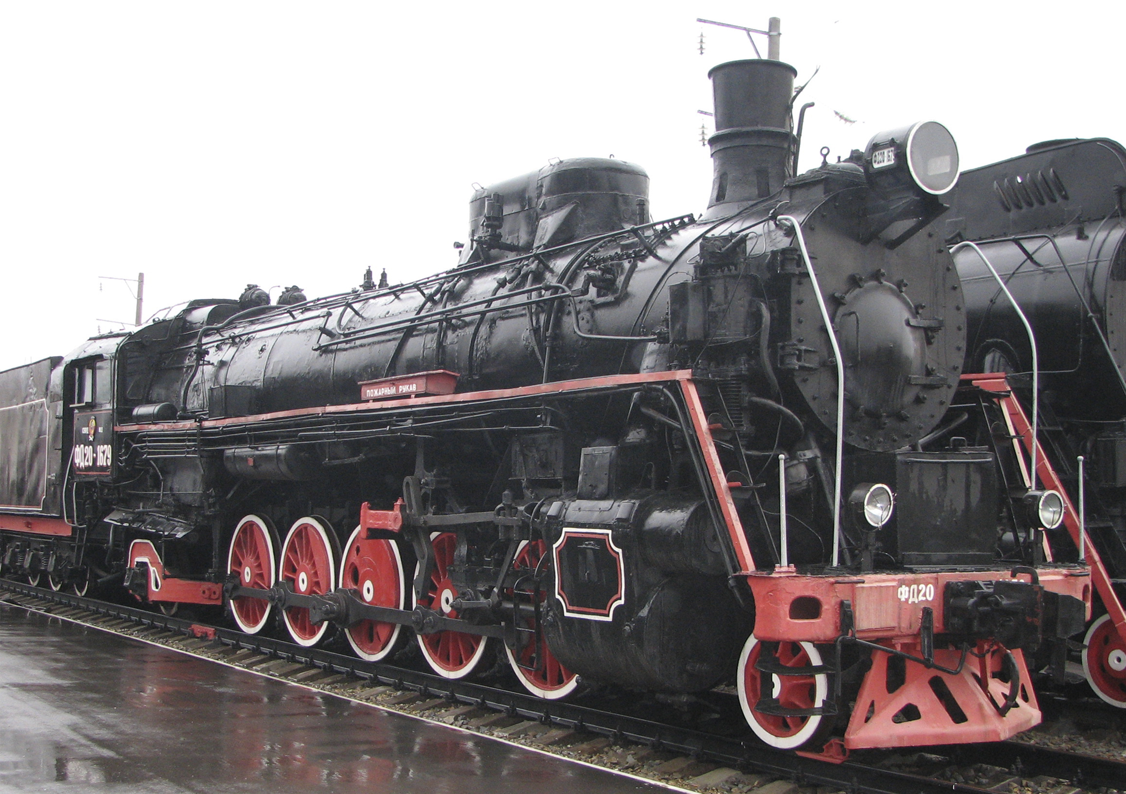 Паровоз построен в 1937 году Луганским паровозостроительным заводом